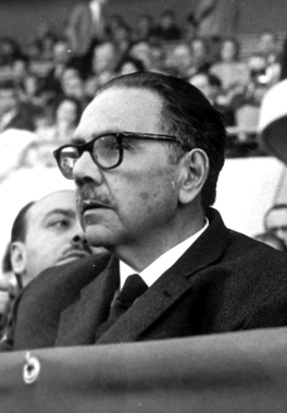 Sotero del Río, Ministro del Interior del Presidente Jorge Alessandri.